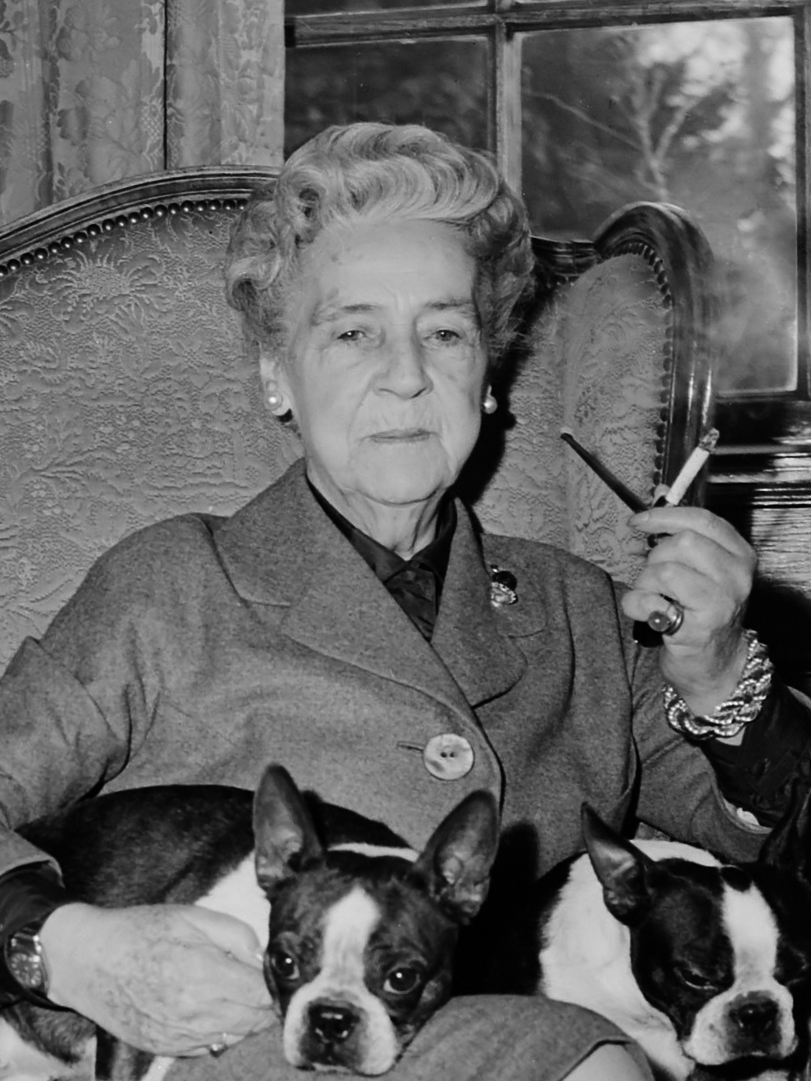 Prinses Armgard, de moeder van prins Bernhard, zittend met twee honden op schoot terwijl zij een sigaret rookt, naar aanleiding van haar 82ste verjaardag 17 december 1965